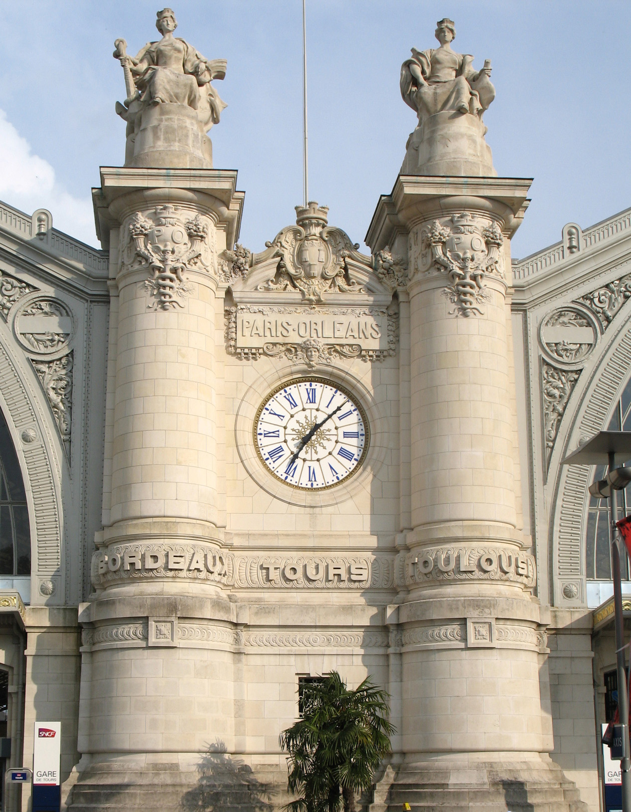 Gare de Tours, Indre-et-Loire, France